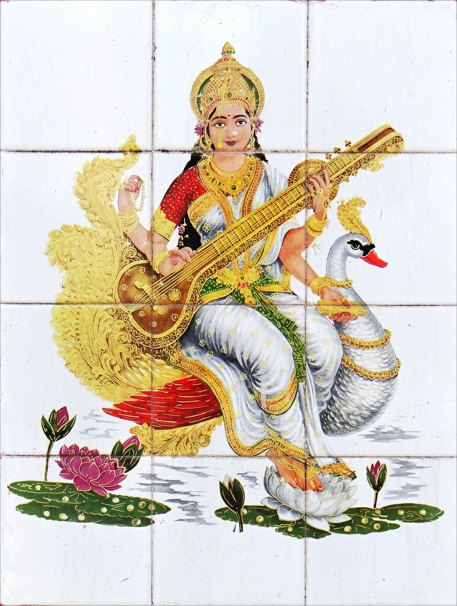 Saraswati (Sanskrit: सरस्वती, Sarasvatī) is the Hindu goddess of knowledge, music, arts, wisdom and nature. She is a part of the female trinity of Saraswati, Lakshmi and Parvati. She is found and revered in southeast Asian countries such as Cambodia, Bali Indonesia as well as Japan. She is called Benzaiten in Japanese temples. She is often shown with lotus and swan, both symbolically linking knowledge with karma and moksha. Représentation de Sarasvati sur le mur d'enceinte du temple recouvert de carreaux de céramique. Sarasvati déesse de la connaissance, de l'éloquence, de la sagesse et des arts, était aussi à l'époque védique, la divinité des rivières. Elle est l'épouse, la shakti de Brahma, le dieu créateur de la trimurti indienne et leur union souligne la notion que la connaissance est une condition sine qua non de la création. Les possessions matérielles ne l'intéressent pas, aussi elle est habituellement habillée d'un simple sari blanc. Sa monture est un grand cygne blanc, parfois un paon. Parfois assise dans une fleur de lotus, deux de ses quatre bras jouent de la vina, un autre tient un livre, les Veda, le dernier un chapelet ou un crochet à éléphant.